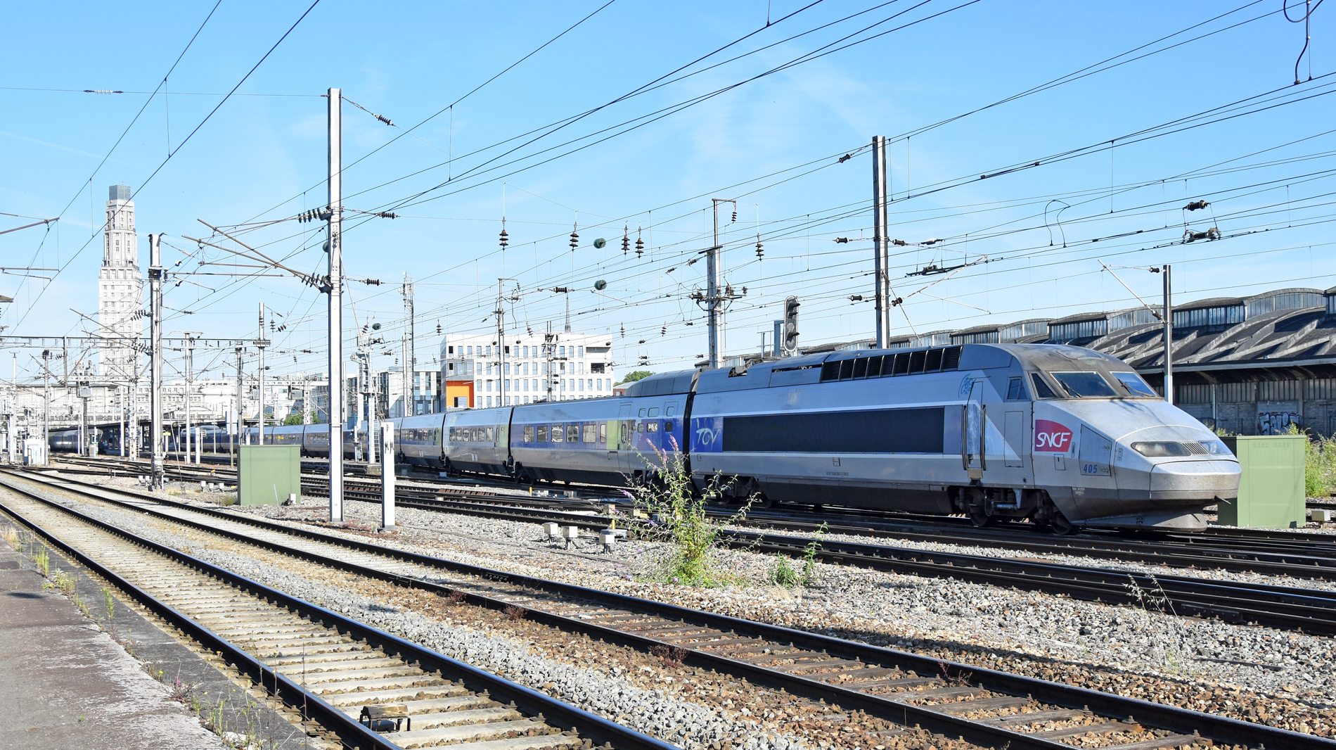 TGV Atlantique n°405 à Amiens